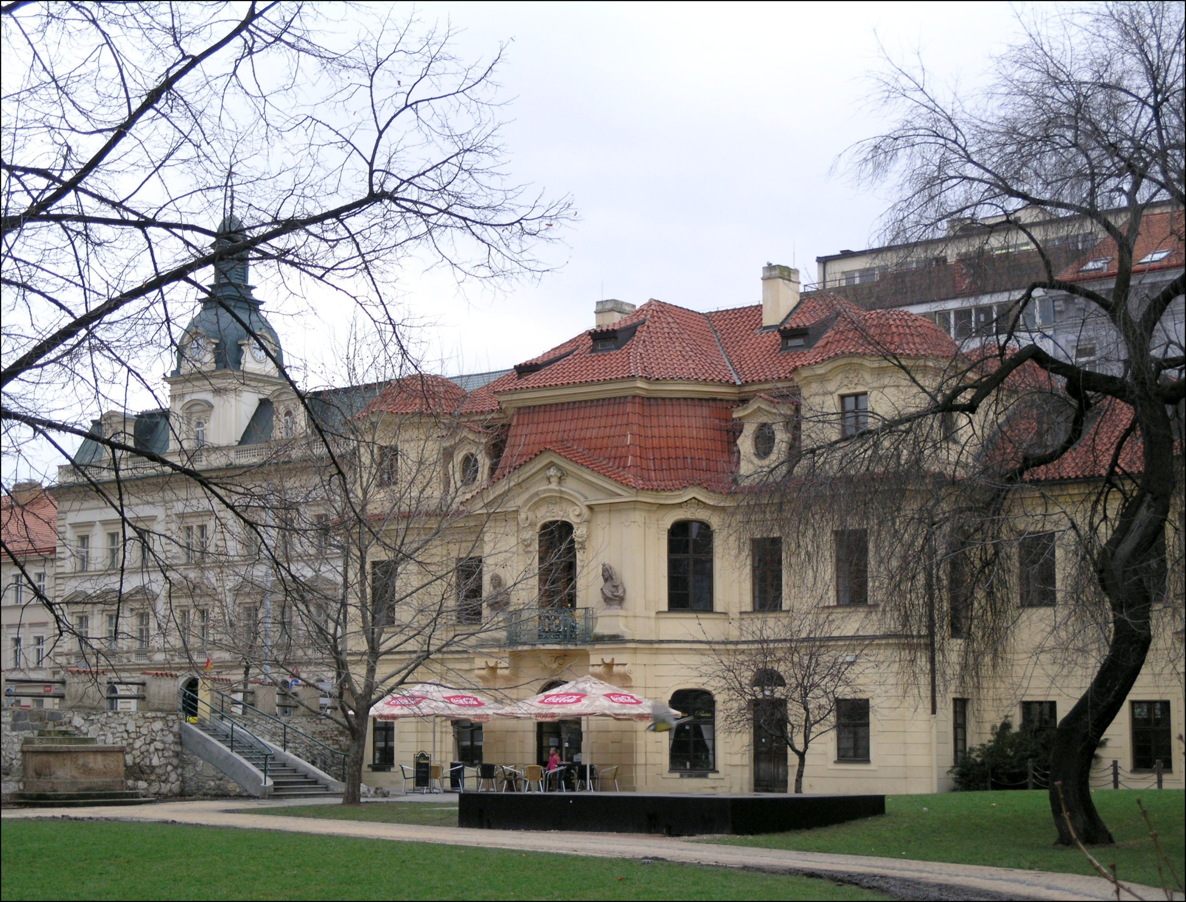 vila Portheimka